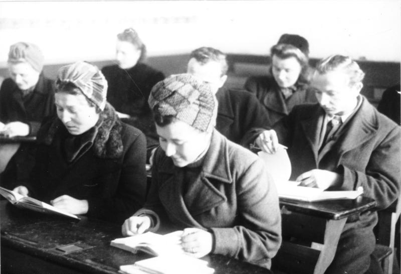 ADN-ZB/Donath Neulehrerausbildung in Berlin-Lichtenberg, an der zu 48 Prozent Männer und zu 52 Prozent Frauen teilnehmen. Insgesamt befinden sich im Jahre 1946 in der sowjetisch besetzen Zone Deutschlands 22.000 Neulehrer in Ausbildung. Aufn. Febr. 1946